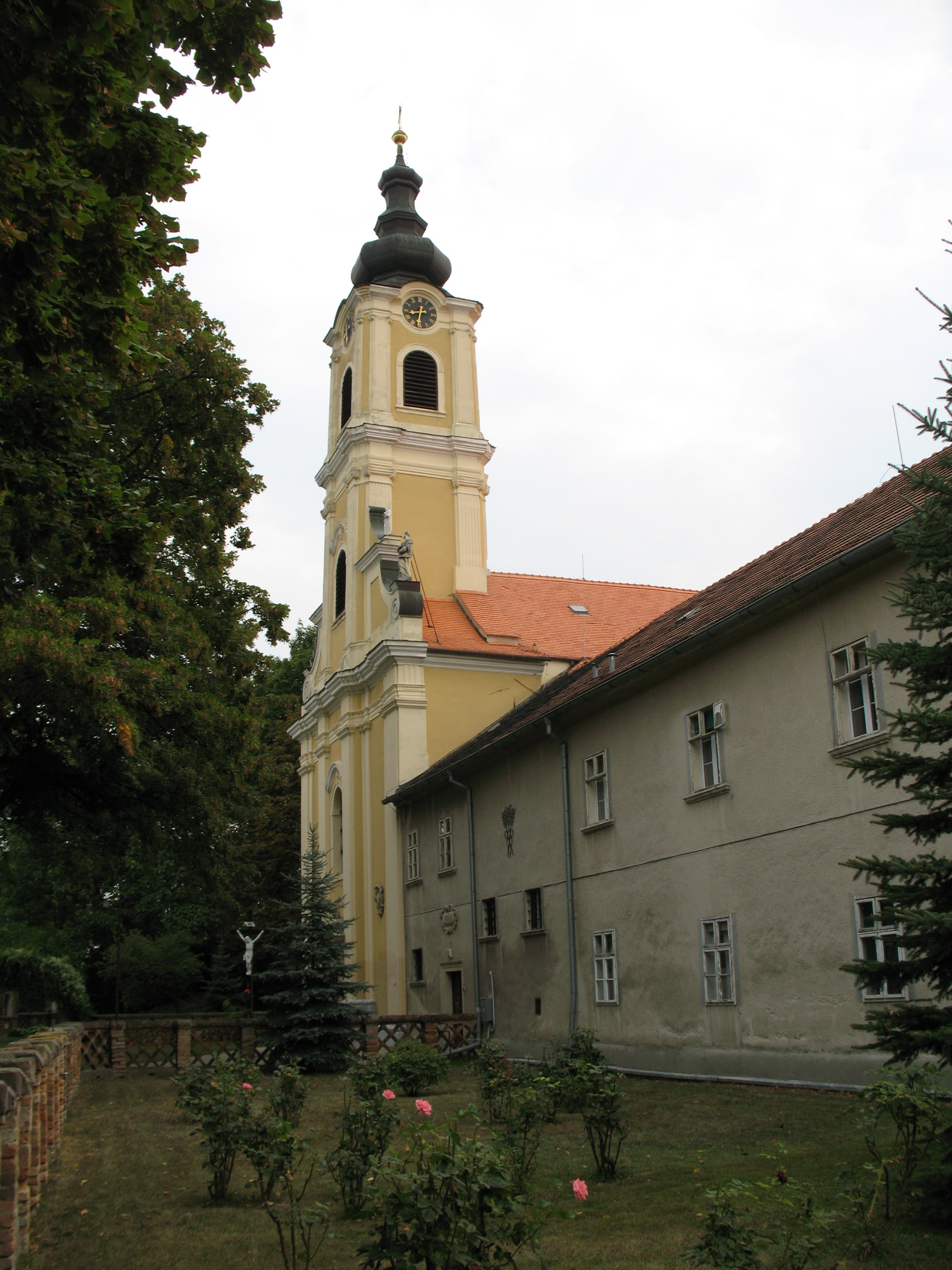 templom